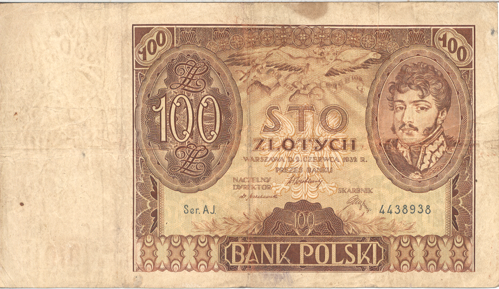 100 złotych z 1932 r. AWERS